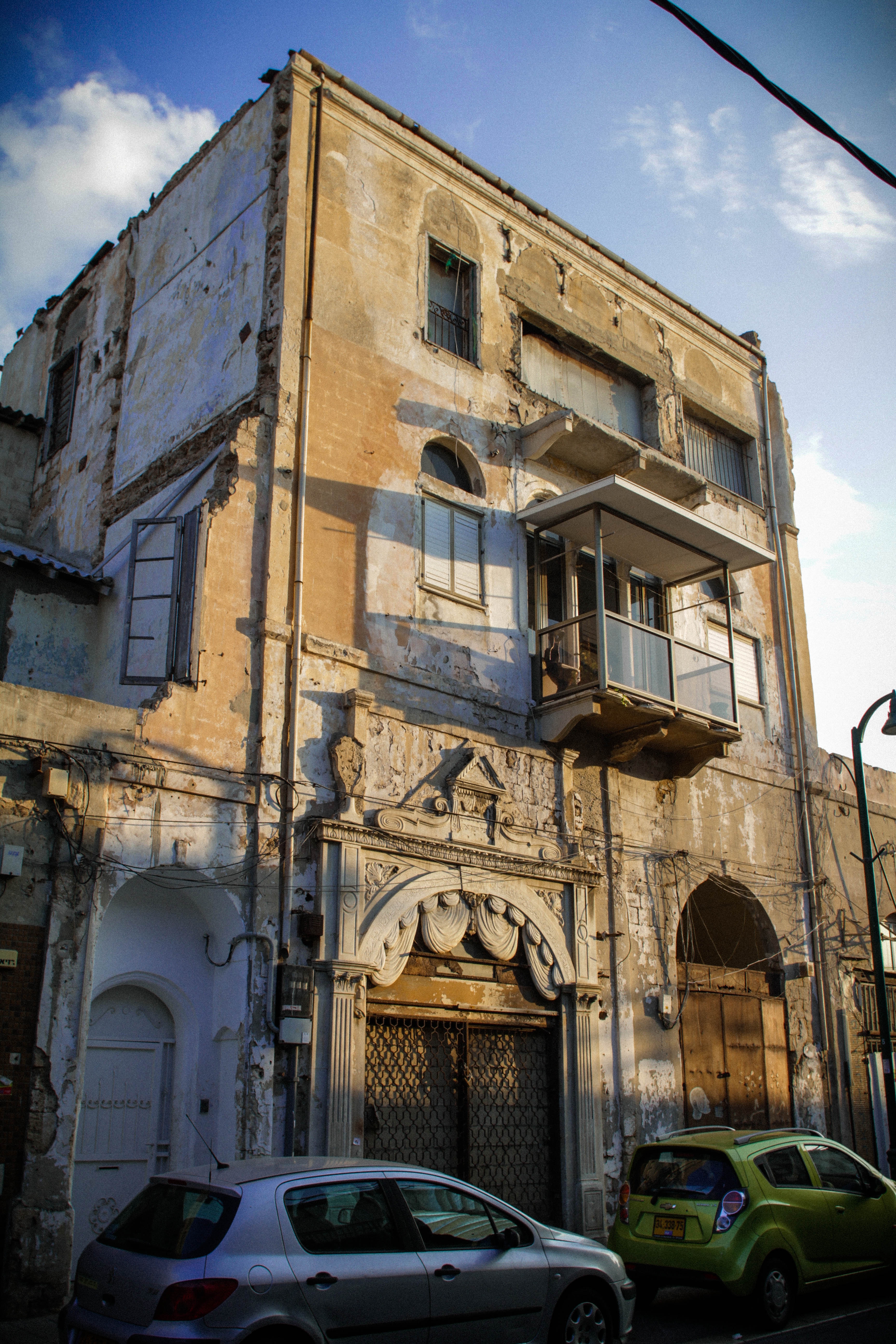 המשרד הארצישראלי היה הזרוע המבצעת של ההסתדרות הציונית בארץ ישראל שתפקידו העיקרי היה קידום, מימון וניהול פעילות ההתיישבות בארץ. פעילותיו כללו תכנון ההתיישבות, קניית אדמות, הקצאת כספים, רכישת קרקעות, הקמת יישובים חקלאיים ועירוניים חדשים, ניהול חוות חקלאיות, הקצאת מתיישבים ליישובים השונים, עזרה ליישובים קיימים בהדרכה ועזרה לפועלים. הבניין ההיסטורי של המשרד הארצישראלי שכן ביפו, ברחוב רזיאל מספר 17, ונהרס בשנת 2001 על ידי בעליו, הכנסייה המארונית, על אף שהיה מבנה לשימור.